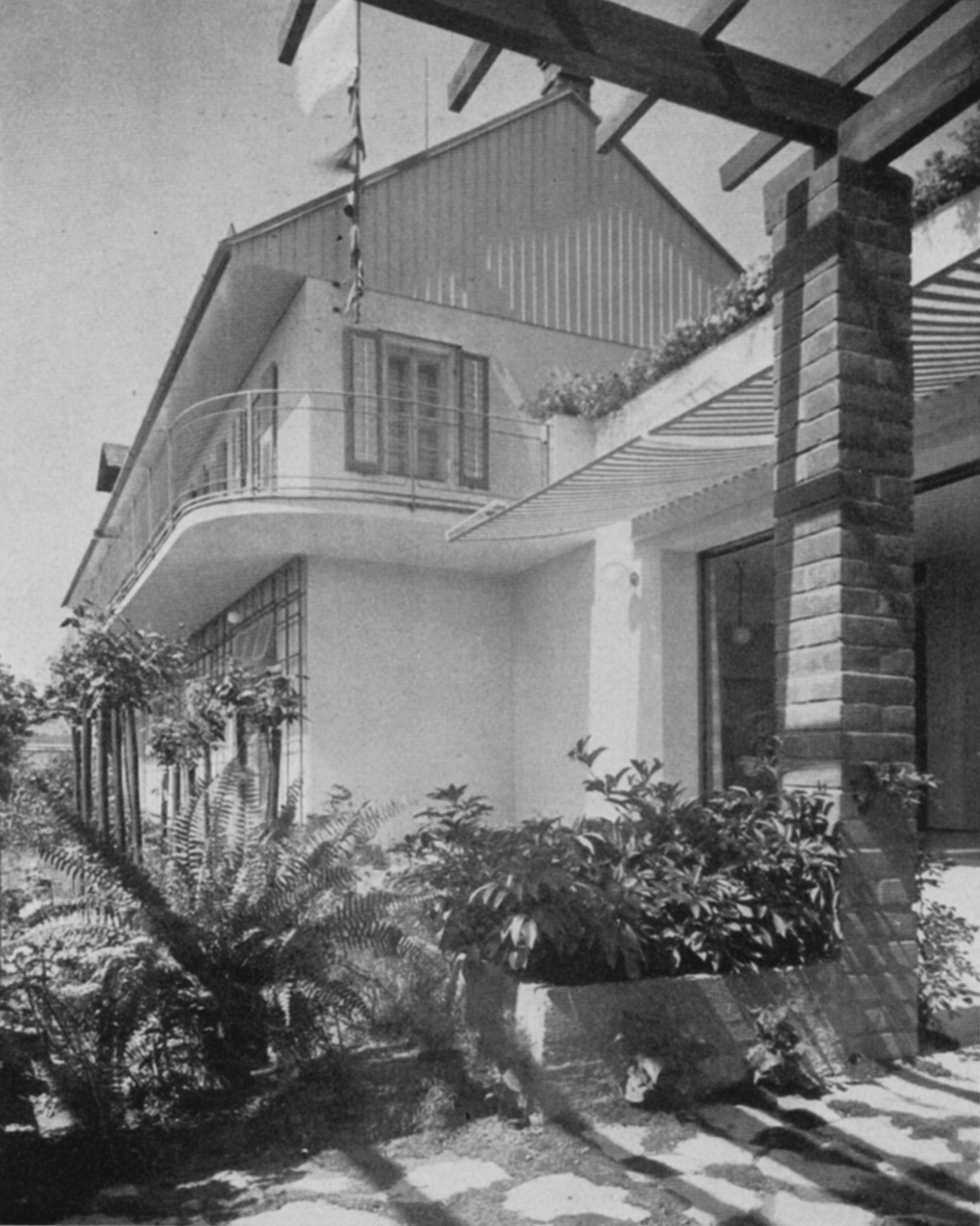 Vila Josefa Andera v Olomouci, pohled od jihovýchodu.